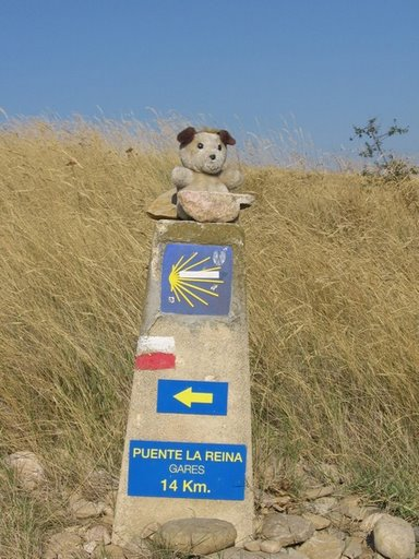 חץ צהוב לאורך קמינו דה סנטיאגו